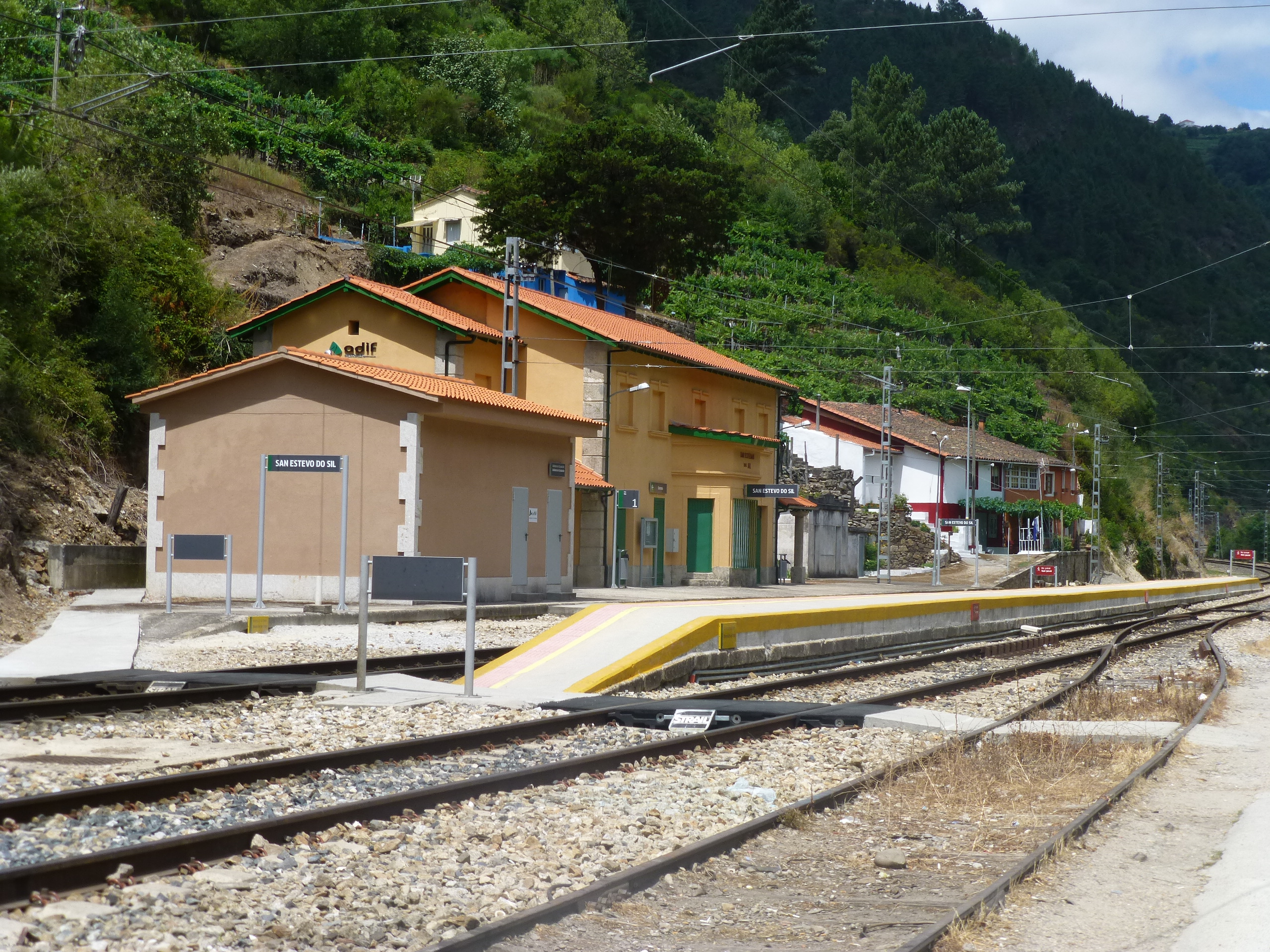 Estación de ferrocarril de Santo Estevo de Ribas de Sil. Ourense Galicia españa